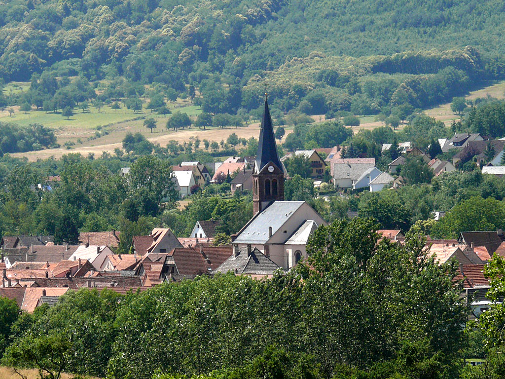 Vue du village depuis le Bari, Eglise Saint-Michel